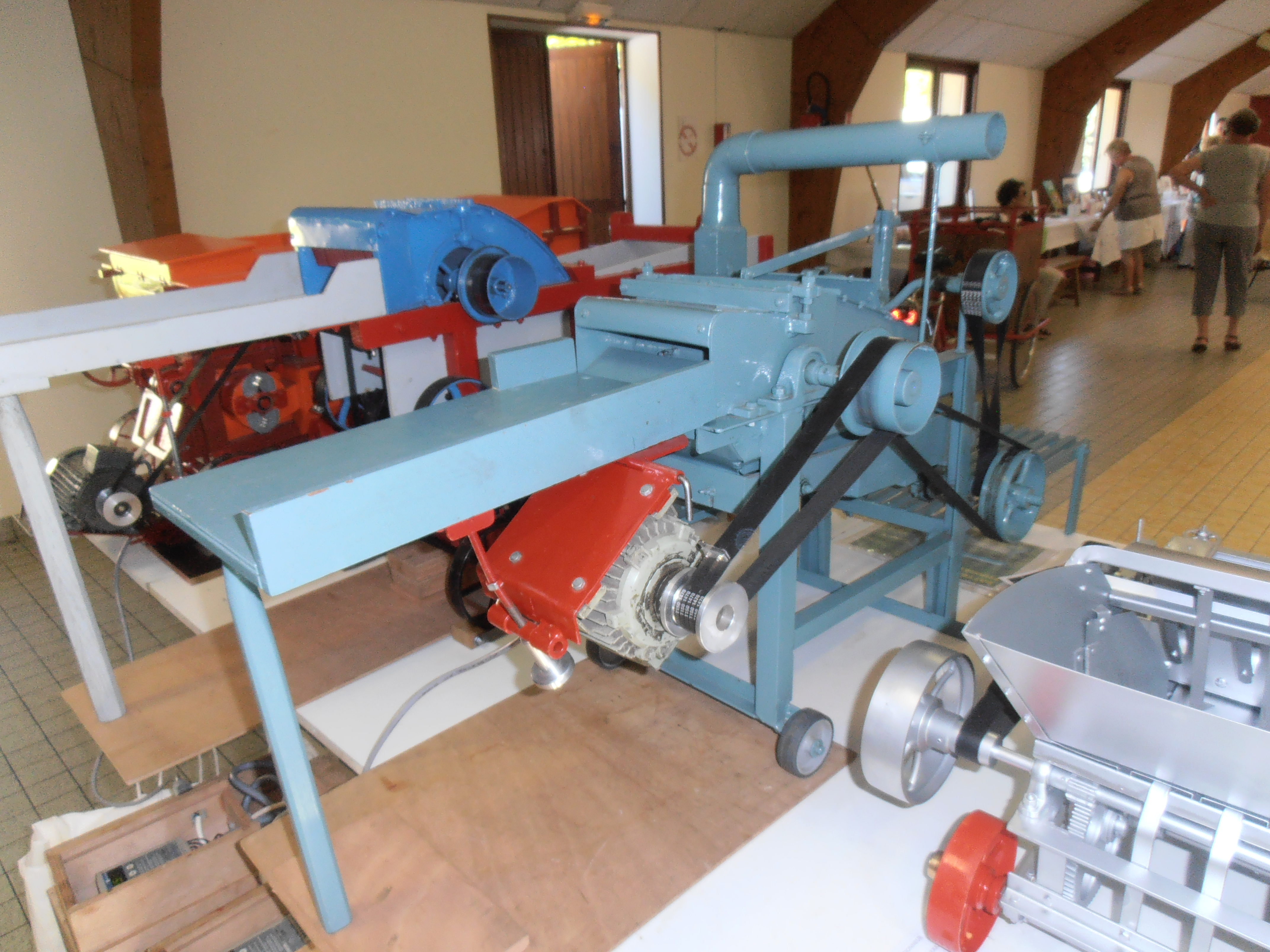 Orne, Saint-Martin d'Ecubleï, Fête du village et brocante du 7 juin 2015. Exposition de maquettes de matériel agricole dans la salle des fêtes par Roger Vervenken, collectionneur réalisateur